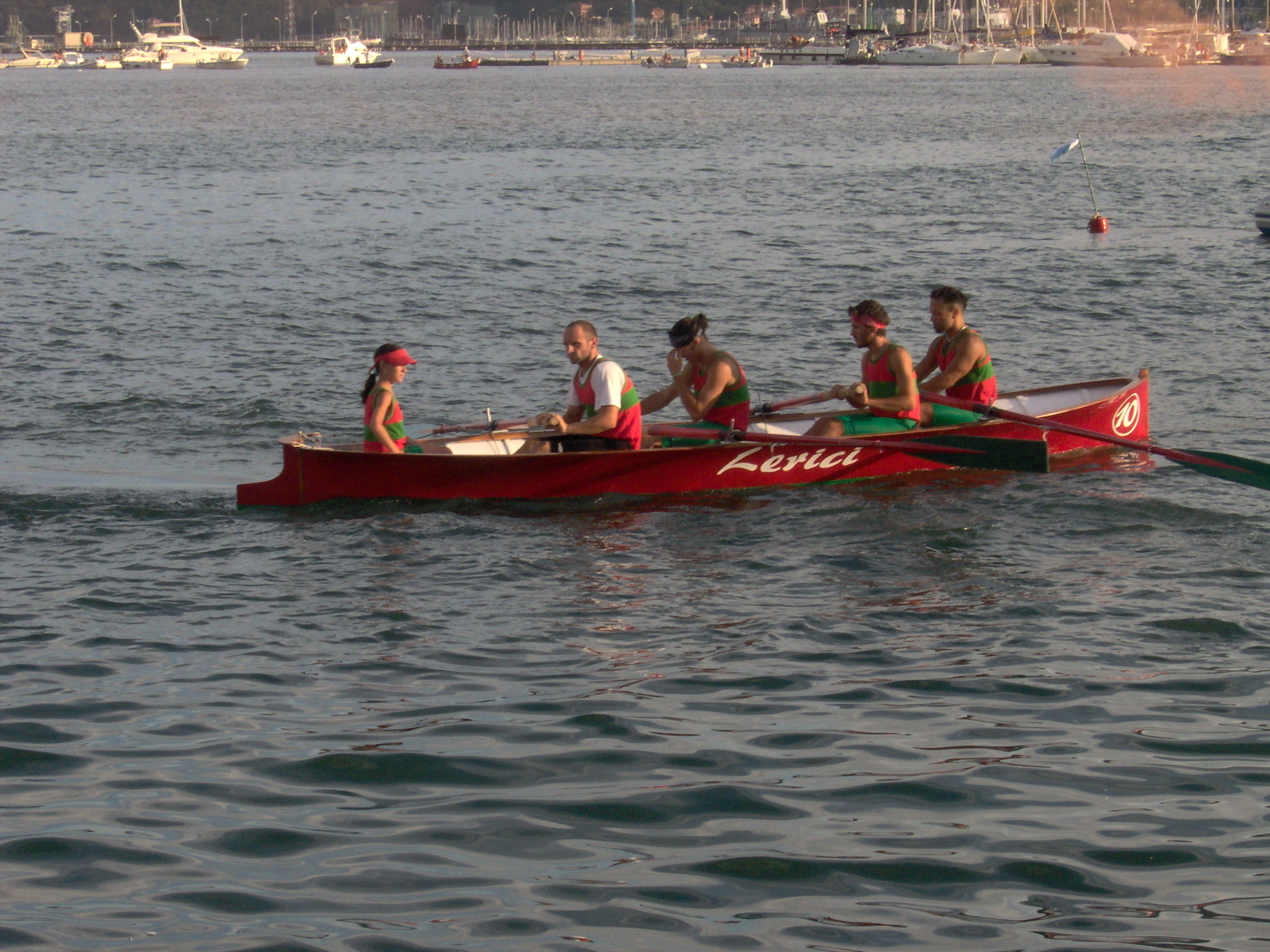 La borgata di Lerici primo classificato Palio del Golfo 1986 e 2012